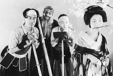 『爆彈花嫁』、1935年、スチル写真